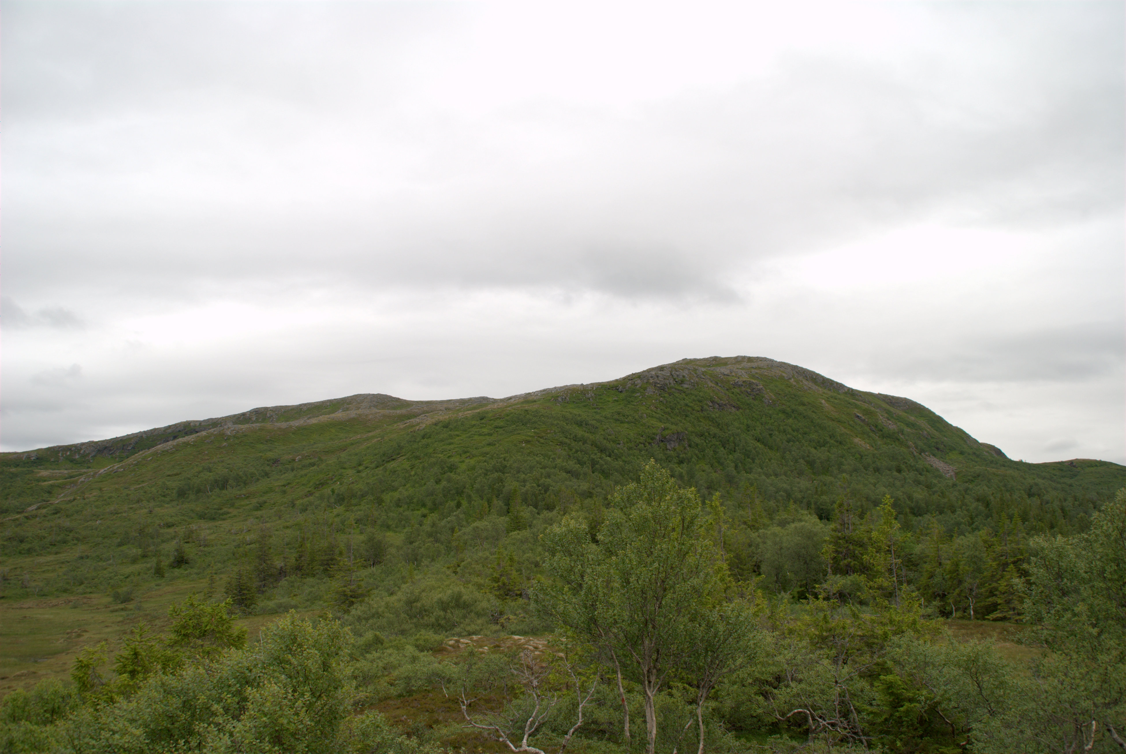 Storheia 600,5 moh (til venstre) i Osen kommune i Sør-Trøndelag.